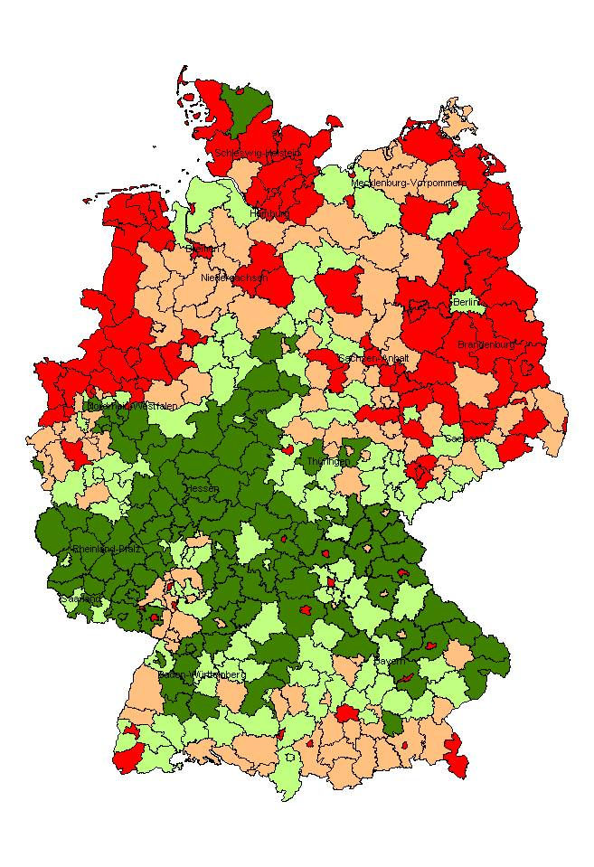 Diagramm der verunglückten Kindern als Radfahrer je 1000 der Altersgruppe nach Kreisen 2003 - 2005 aus dem Kinderunfallatlas